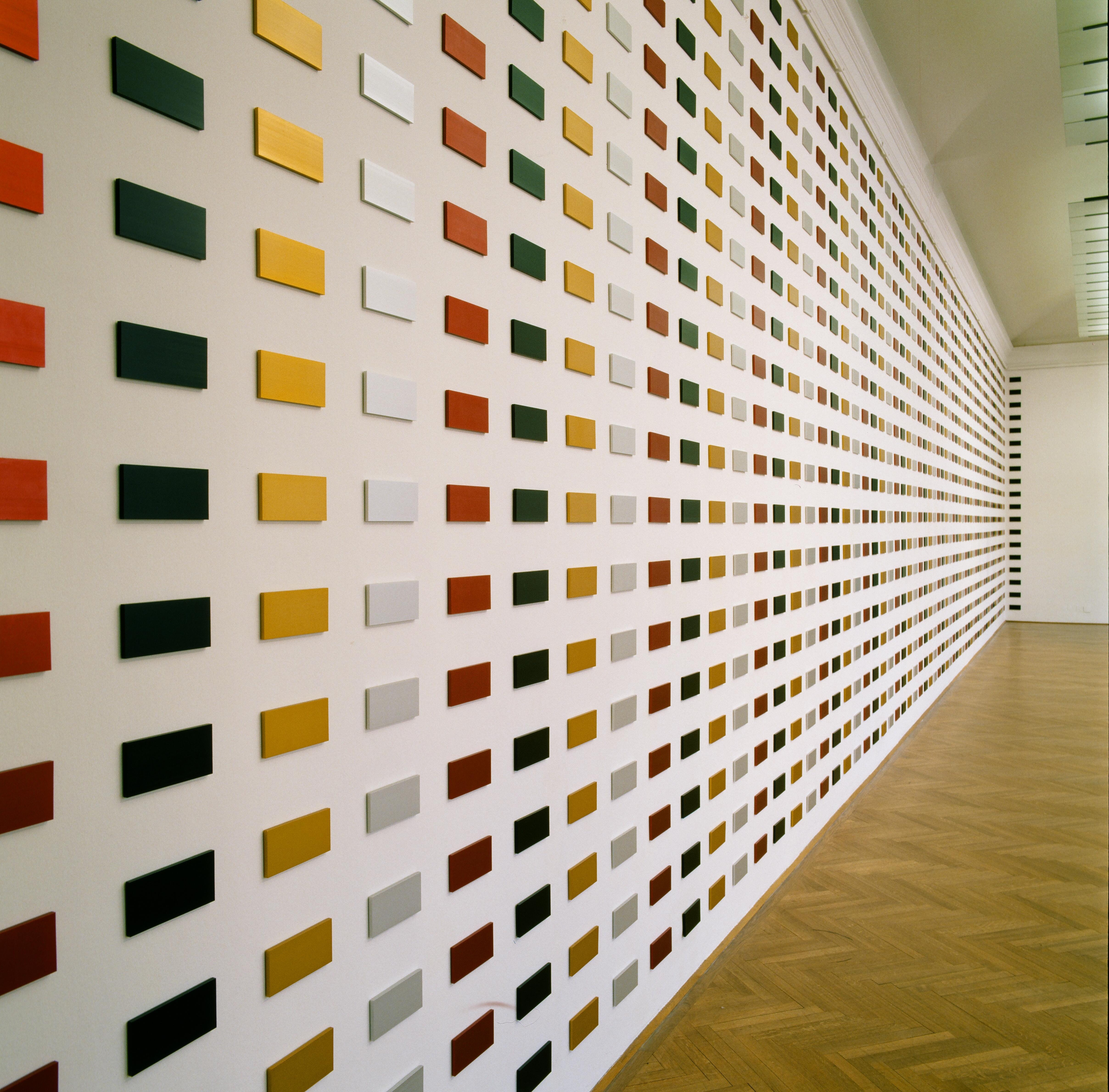 Georg Salner, Rauminstallation SU.SY, Österreichisches Museum für angewandte Kunst, MAK-Galerie, Wien, 1998/99 Ausstellungsdetail: Wandgestaltung Metallon, eloxierte Aluminiumplatten à 10 x 21 x 1 cm